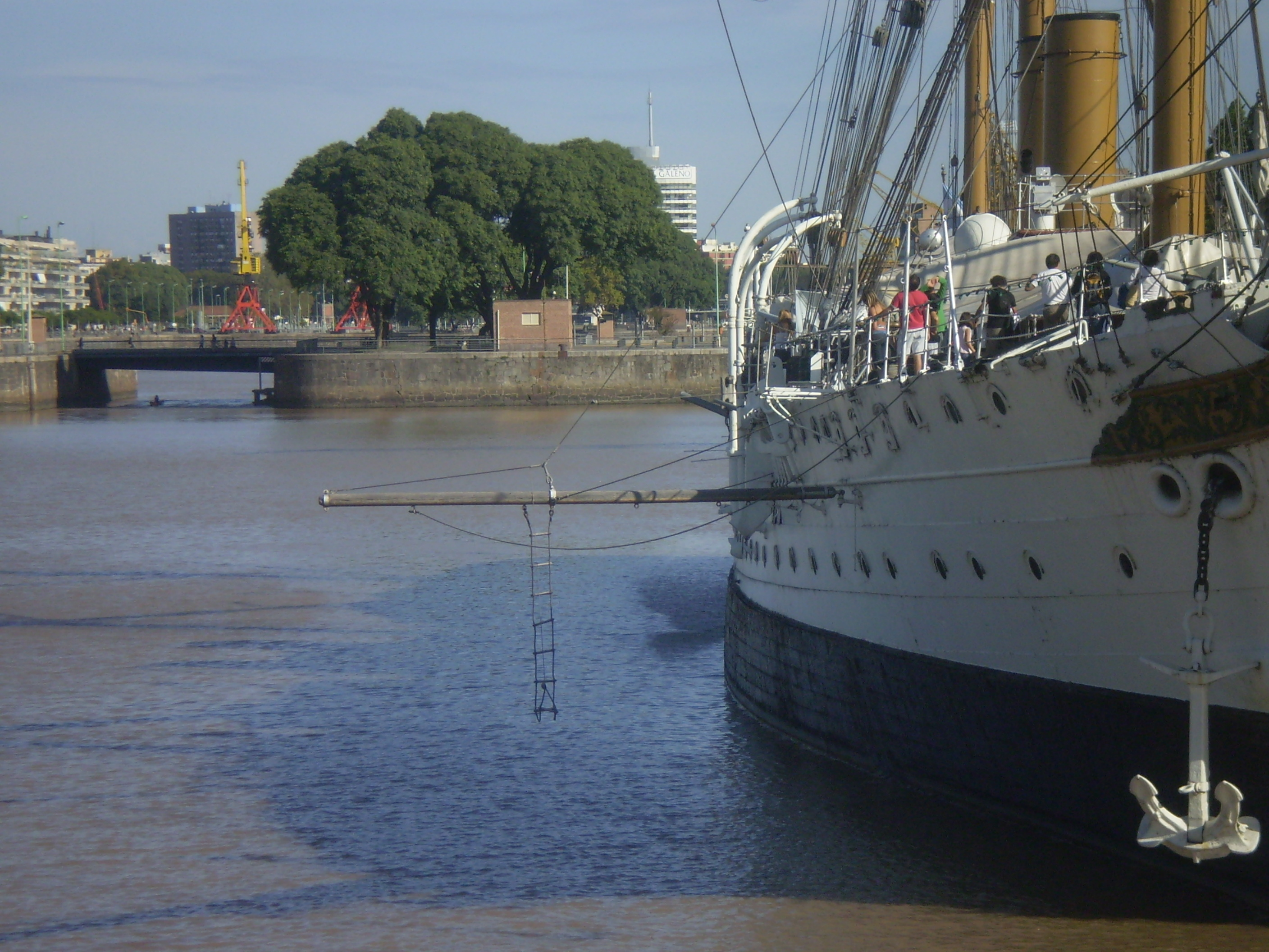 Buque Museo Fragata A.R.A. Presidente Sarmiento, amarrada en puerto Madero, Buenos Aires, Argentina